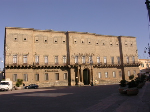 Facciata di Palazzo Imperiali-Filotico